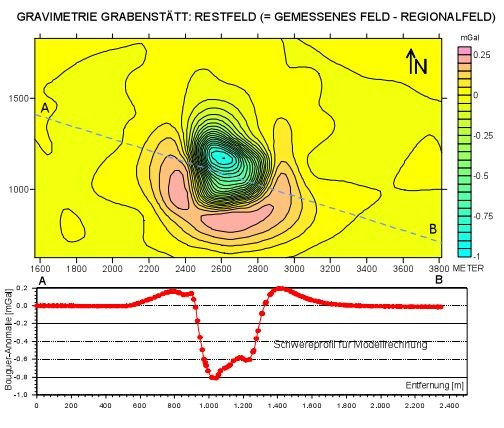 Gravimetrie Grabenstätt Tüttensee: RESTFELD(=GEMESSENES FELD - REGIONALFELD)